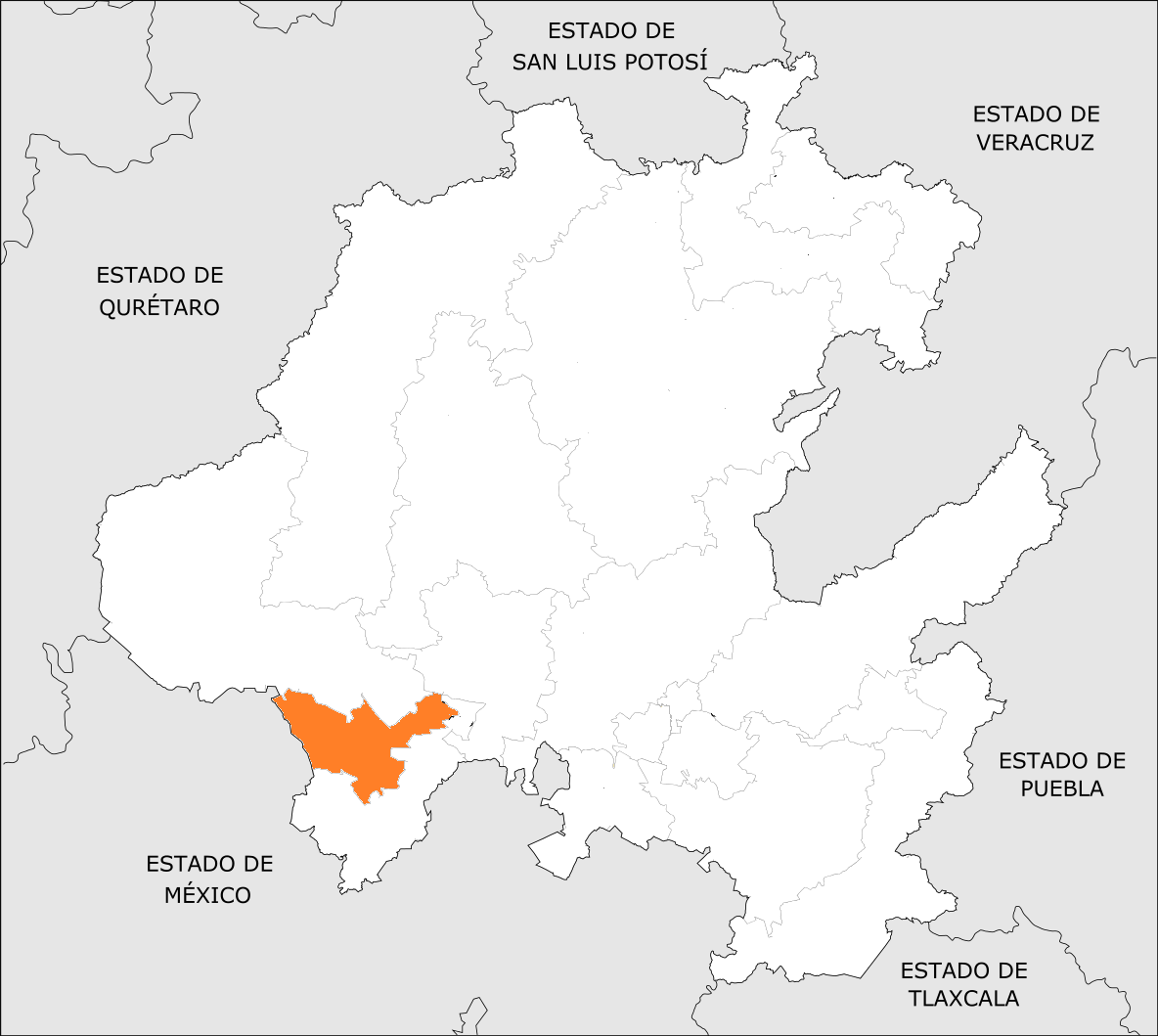 Distrito Electoral Local de Hidalgo 14